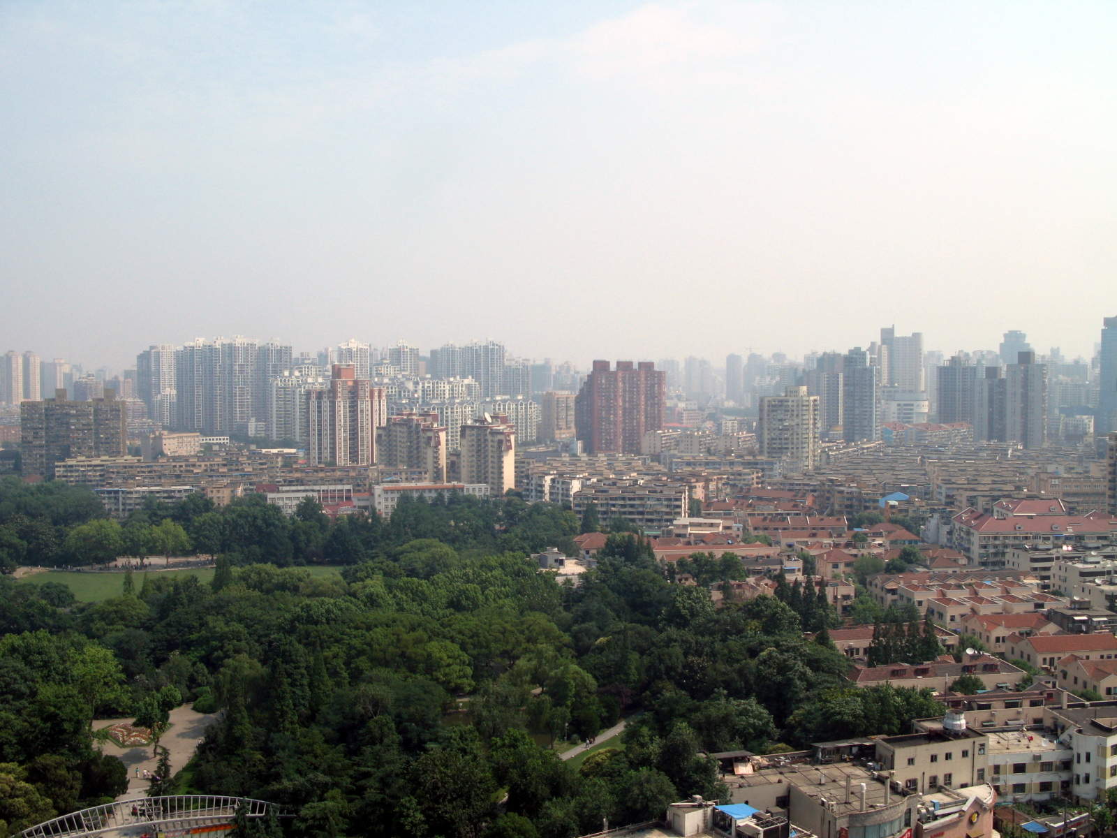 上海長寧區 Shanghai Changning District